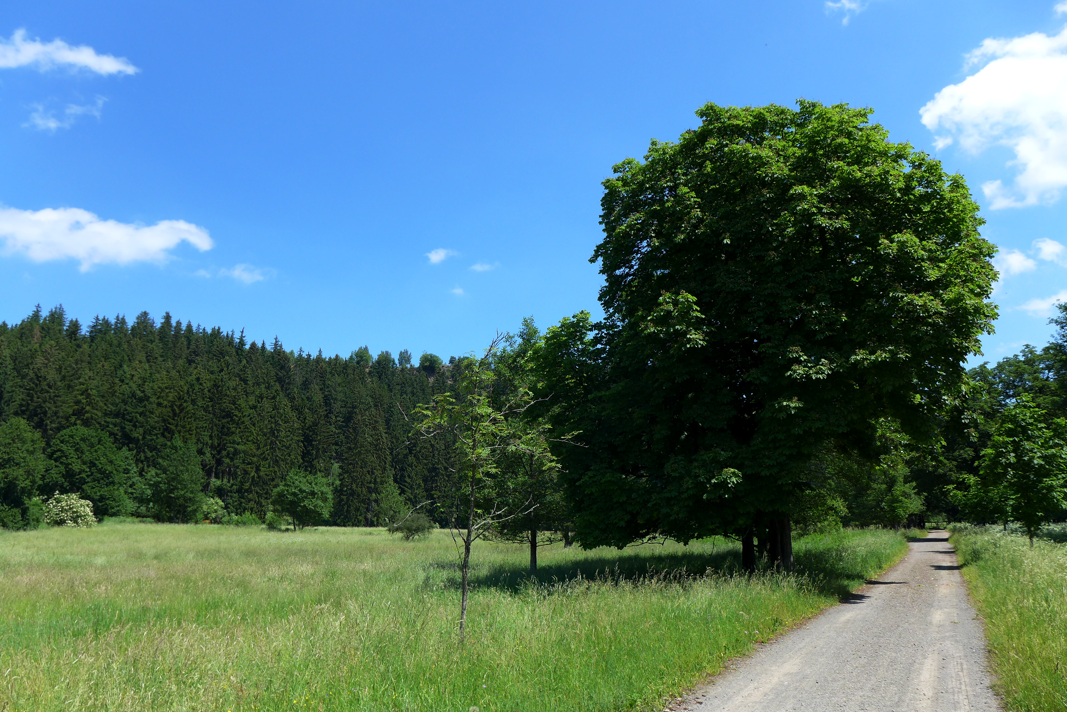 Das Selketal ist ein breites, flaches Tal im Unterharz.